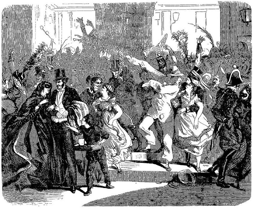 La sortie du bal masqué de l'Opéra en 1860.